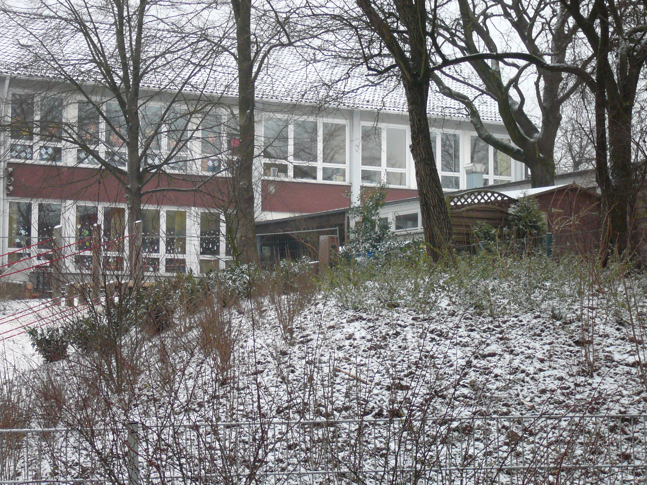 Grundschule Küllenhahner Str, Wuppertal